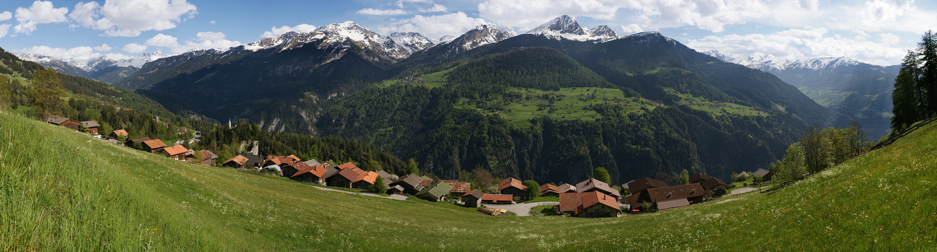 Beim Abstieg von Balnettis zum Schanfigger Dorf Calfreisen. Am südlichen Dorfrand die Ruine Bernegg. Weiter taleinwärts die Kirche von Castiel. Auf der gegenüberliegenden Talseite die Aroser Berge und an den Bergflanken des Gürgaletsch die Dörfer Tschiertschen und Praden. Aus 22 Hochformataufnahmen (2 Reihen à 11 Bilder) EXIF Daten: 23.05.2008 16:49:16 1/640 s - f/8 - ISO 200 - 60 mm Aufnahmestandort: oberhalb des Dorfes. 1304 m - 764428 / 190197 46° 50' 33.3" N, 9° 35' 40.2" E (46.842583°, 9.5945°)